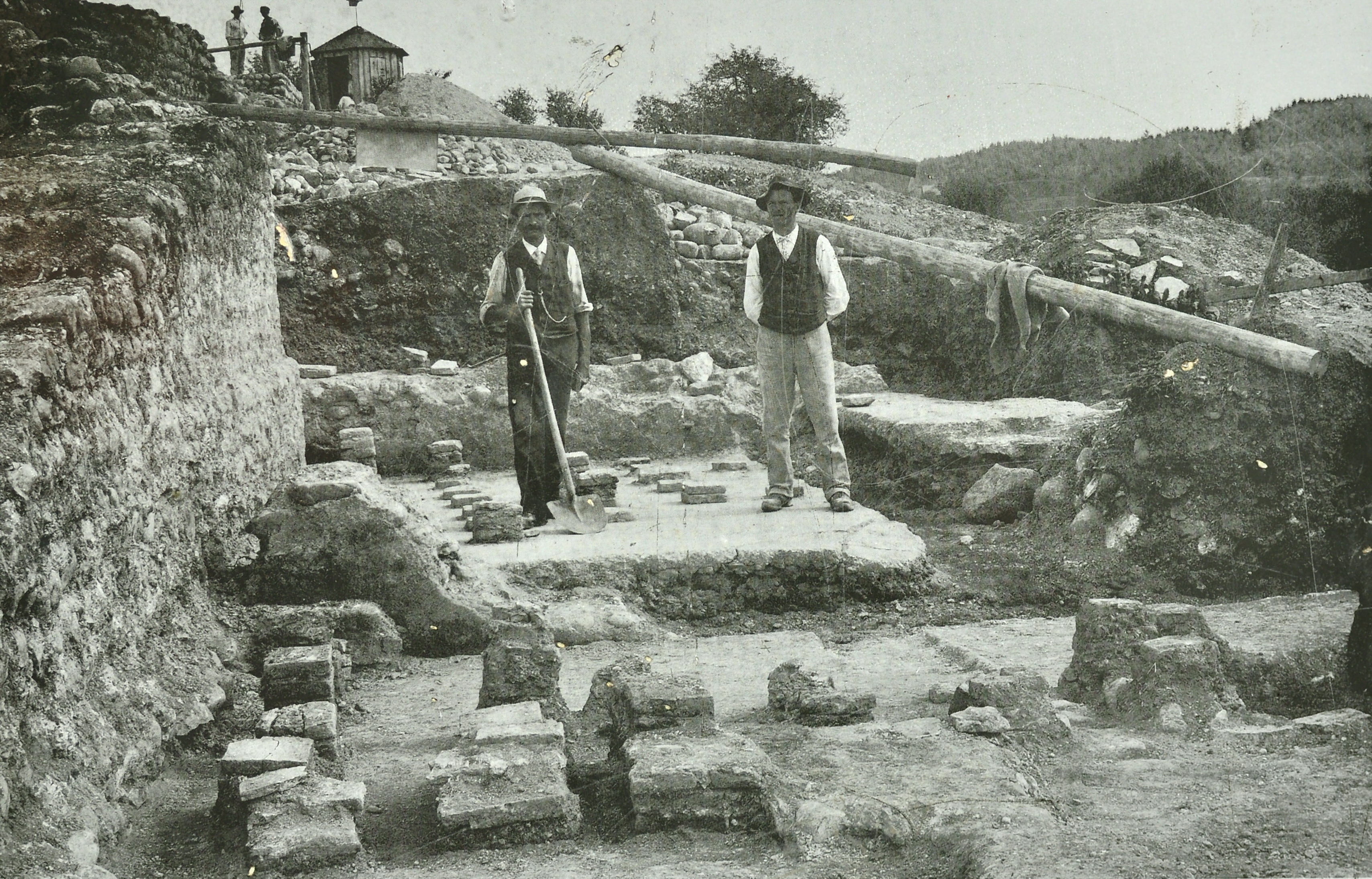 Römisches Kastell in Irgenhausen (Pfäffikon) : Grabungsaufnahme ausserhalb des Südturms mit den Überresten der Hypokaustpfeilern ("Bodenheizung") des unter dem Kastell liegenden Gutshofs aus dem 1. bis 3. Jh. Links die Kastellmauer aus dem späten 4. Jahrhundert. (Eidg. Archiv für Denkmalpflege, Bern).